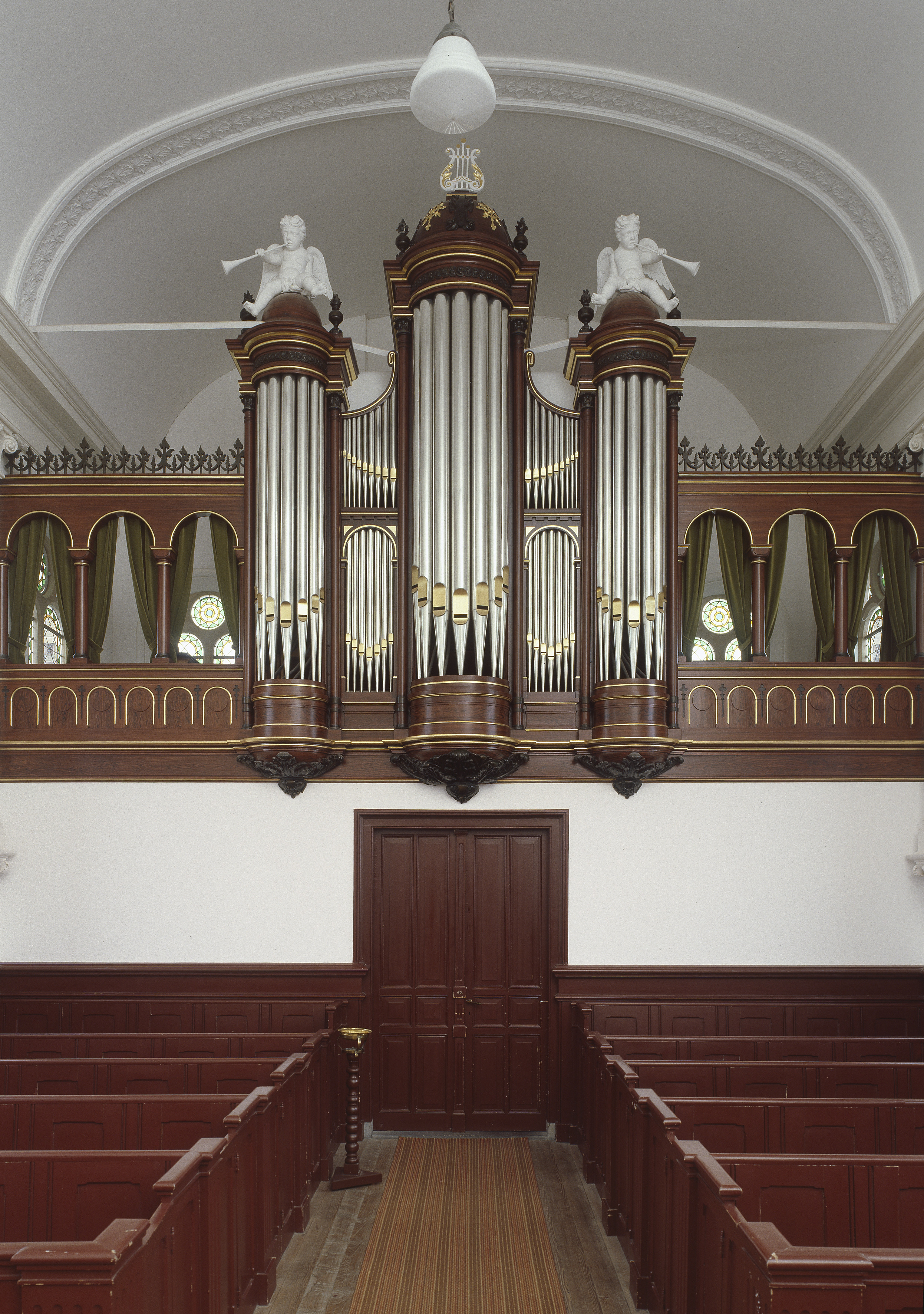 Nederlands Hervormde Kerk: Interieur, aanzicht orgel, orgelnummer 1615 (opmerking: Gefotografeerd voor Het Historische Orgel in Nederland 1878-1886, Bladzijde 326)